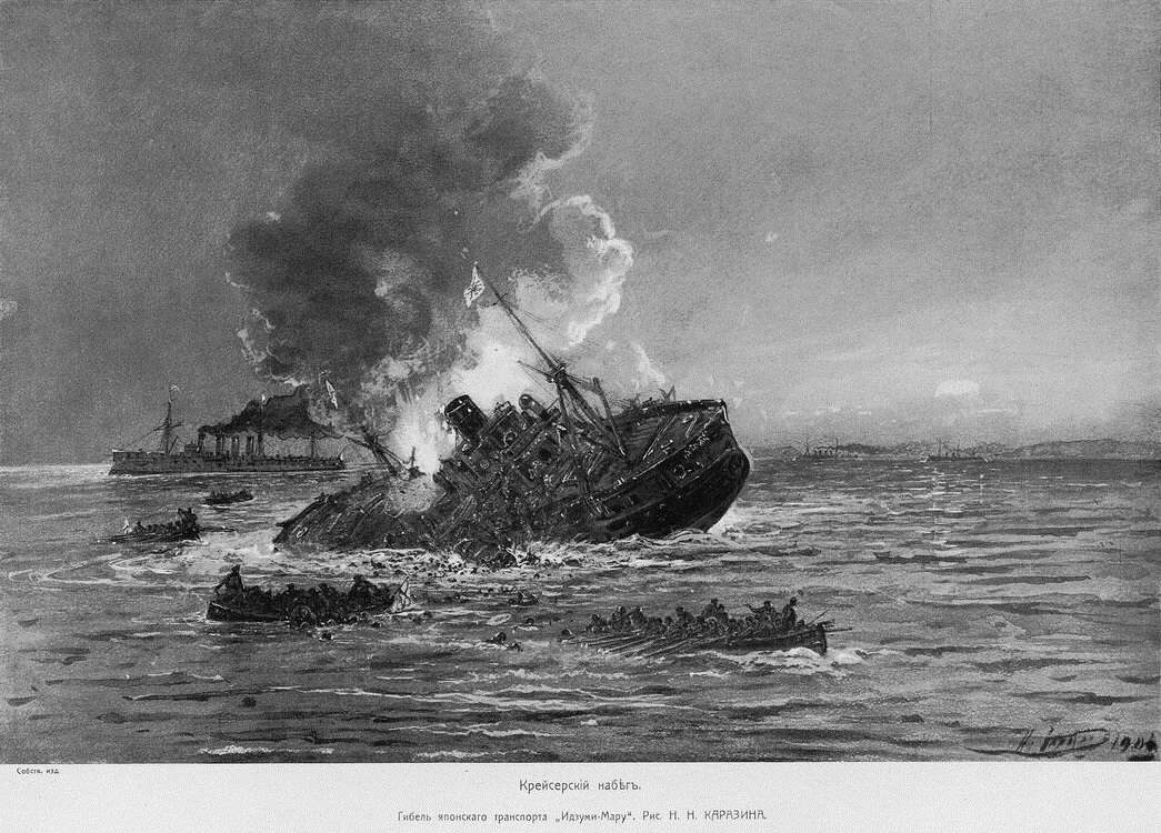 Потопление японского транспорта Идзуми Мару.